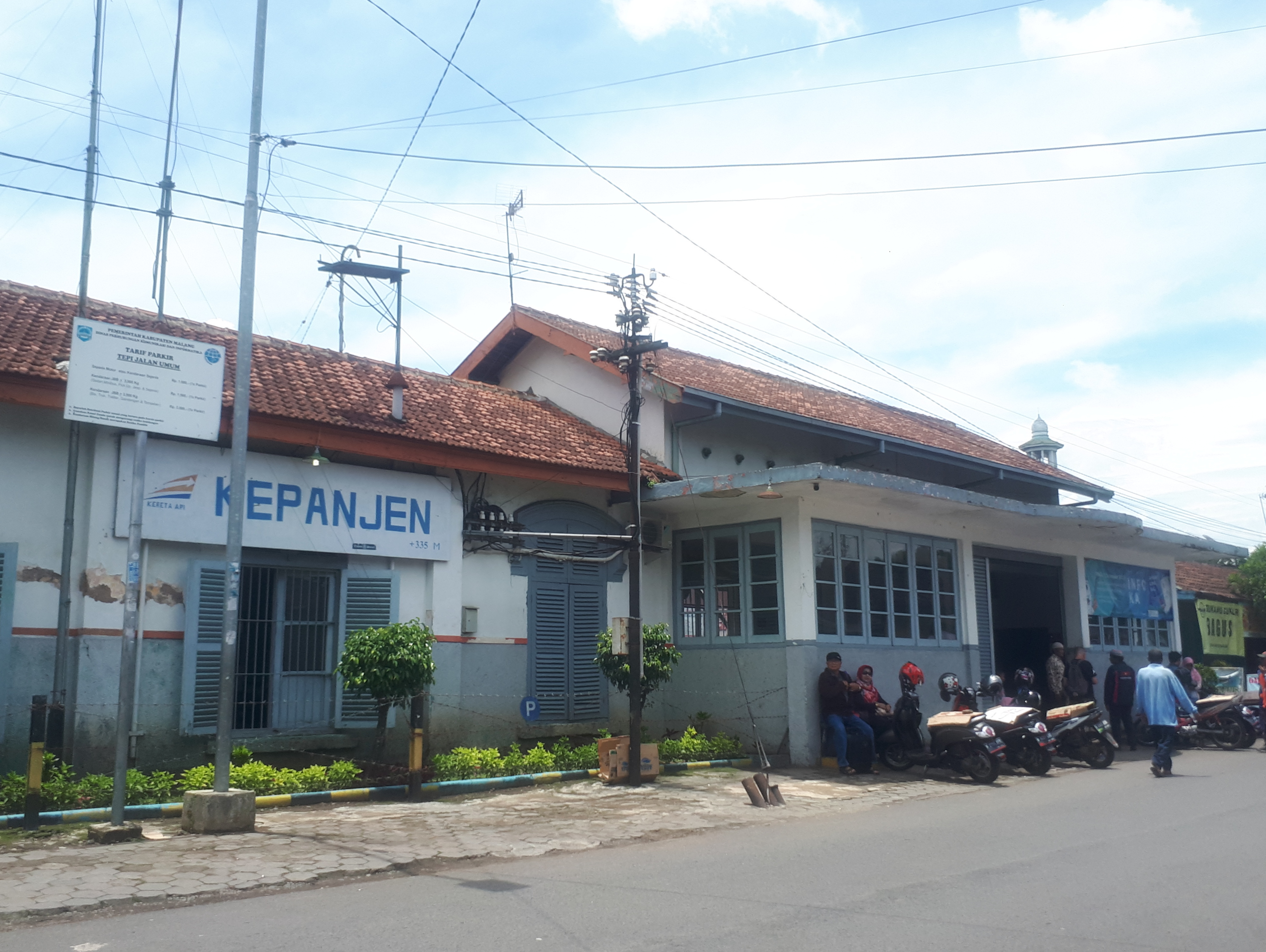 Tampak depan Stasiun Kepanjen tahun 2020